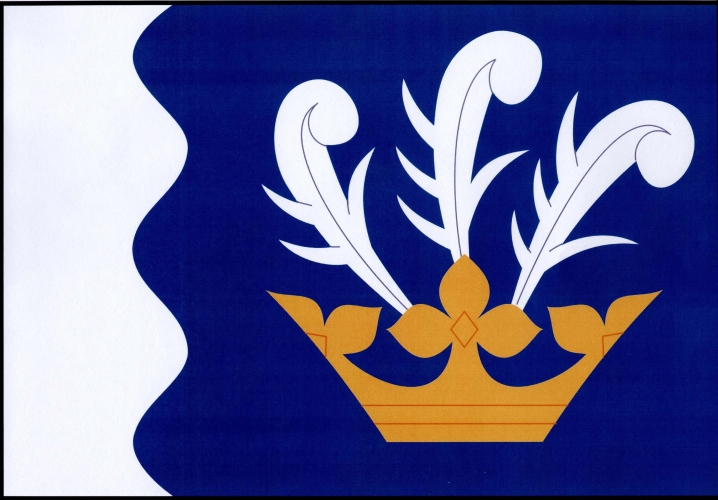 vlajka, Oslavička, okres Žďár nad Sázavou